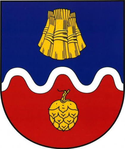 znak,Žiželice , okres Louny